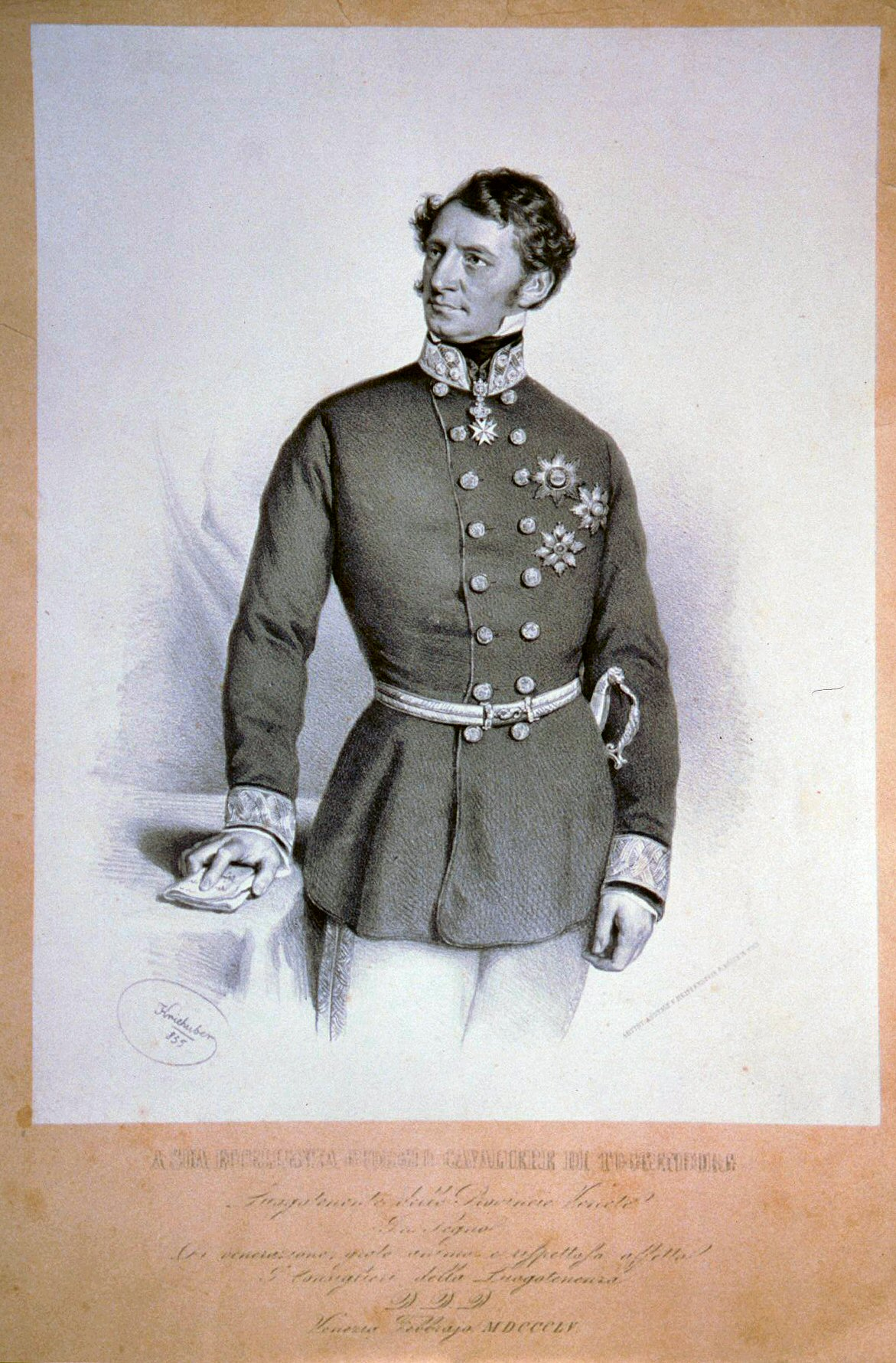 Georg Ritter von Toggenburg (1810-1888) Minister für Handel und öffentliche Arbeiten, Statthalter von Venezien und von Tirol und Vorarlberg